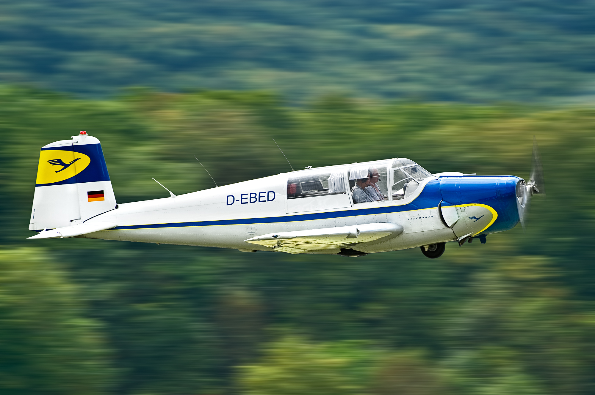 Eine Saab Safir beim Start vom Flugfeld Hahnweide.